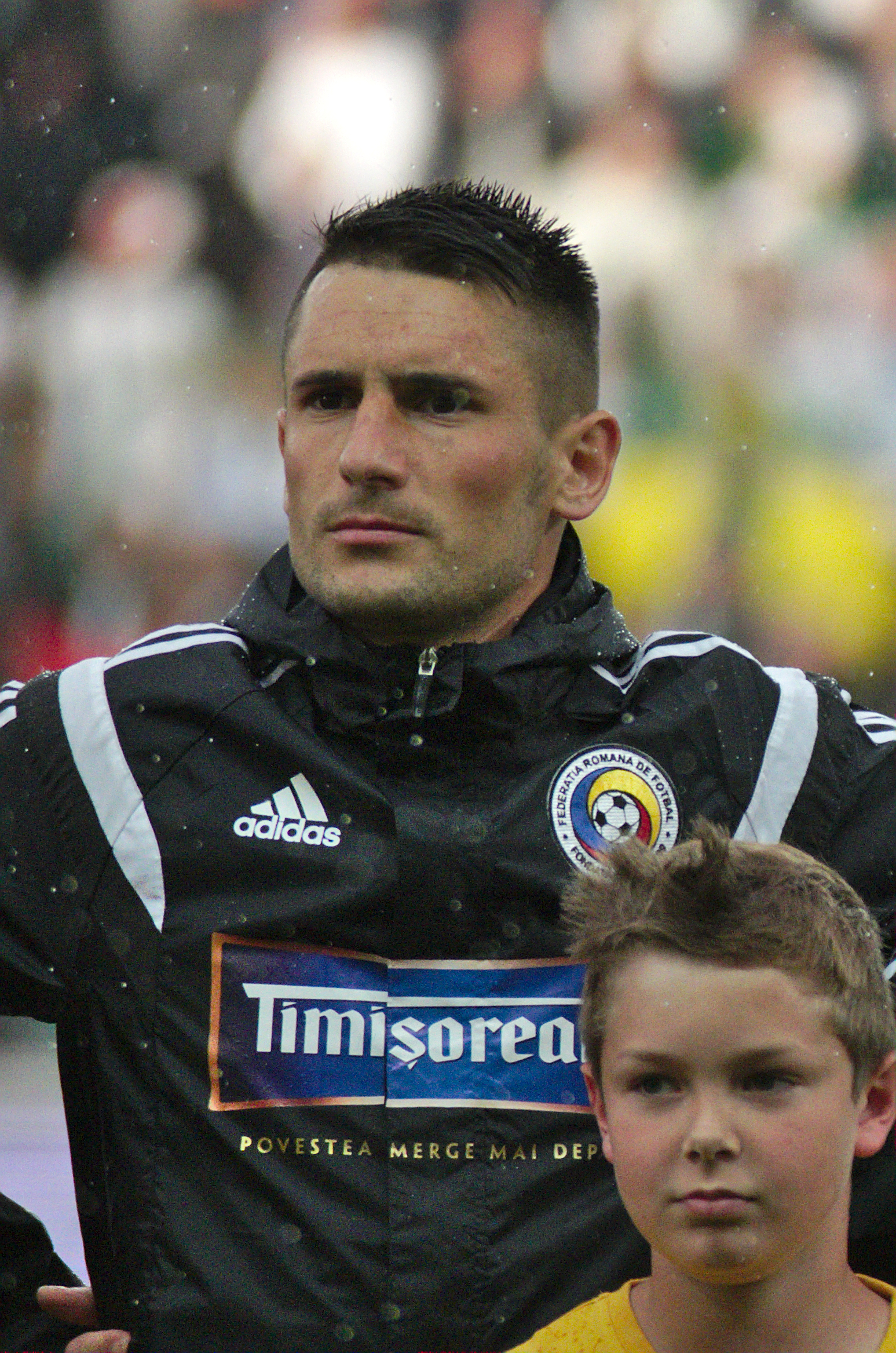 Algérie-Roumanie - 20140604 - Dragoș Grigore